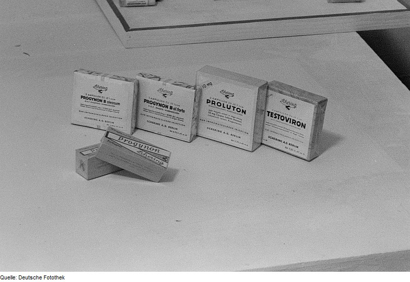 Original image description from the Deutsche FotothekStand der Arzneimittelfabrik Schering A.G. Berlin